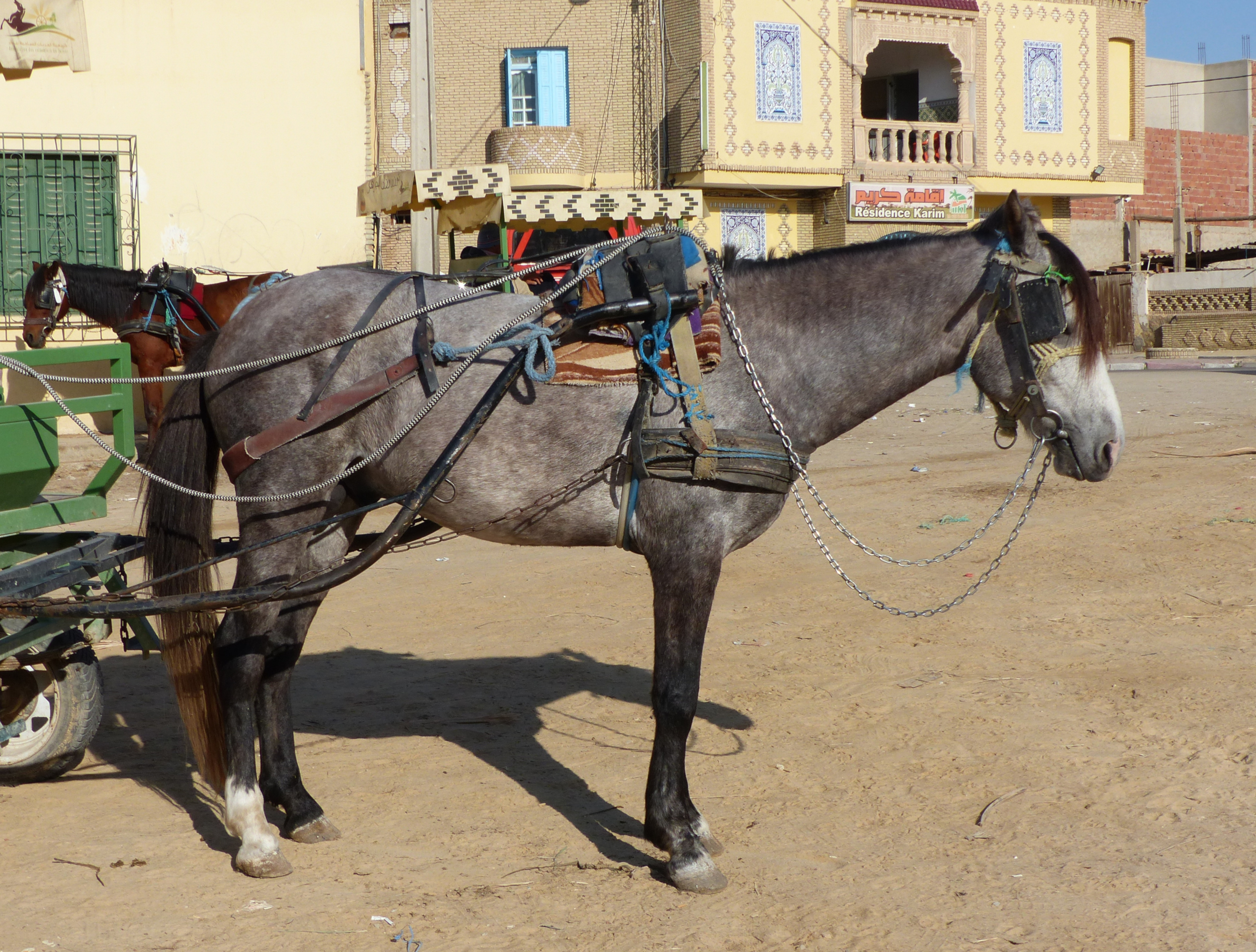 Cheval Barbe tunisien gris, à Tozeur This is an image with the theme "Africa on the Move or Transport" from: Tunisia